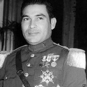 Cuban president Fulgencio Batista, 1952